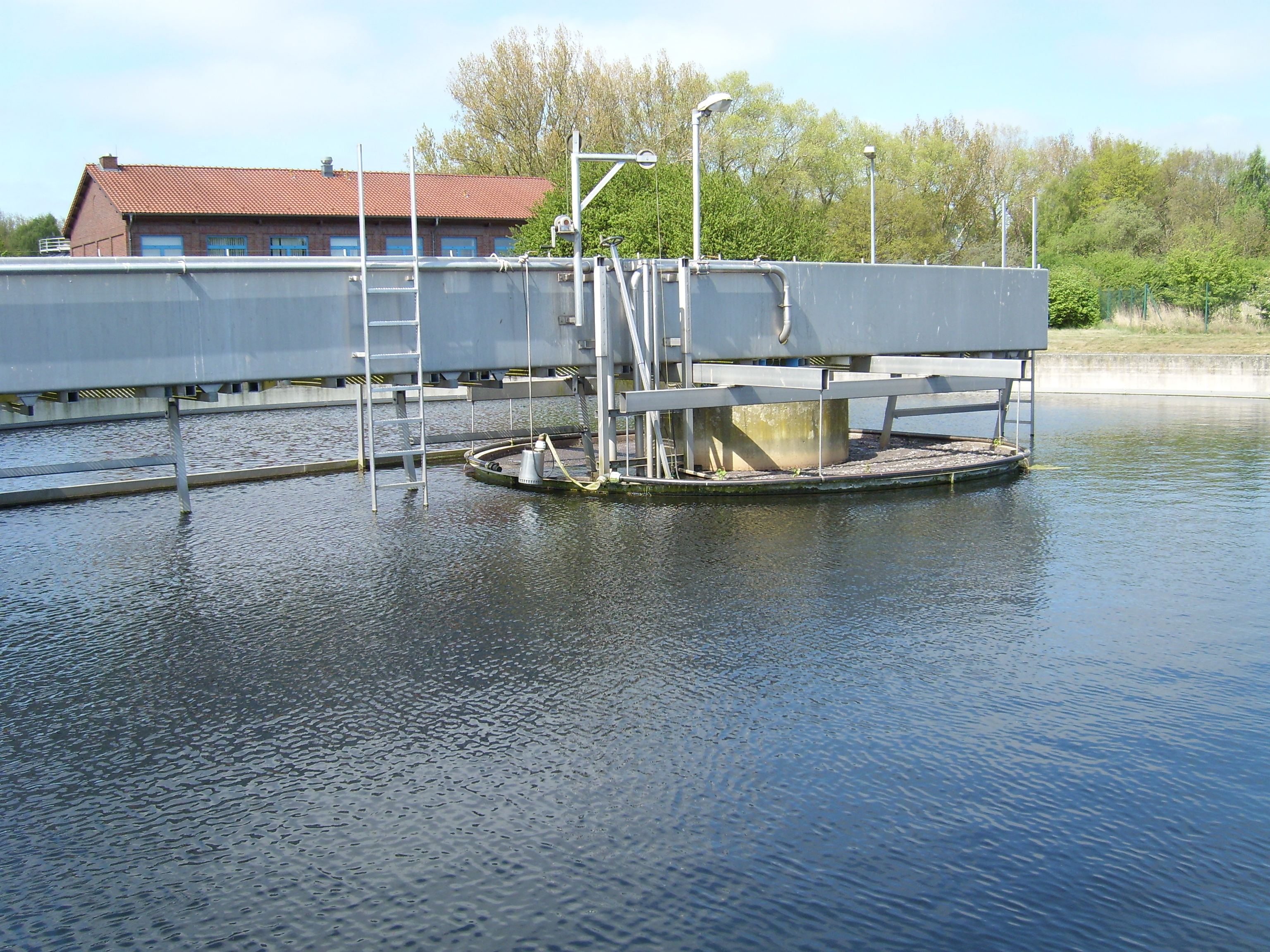 Nachklärbecken (biologische Stufe) im Klärwerk Greifswald im Ortsteil Ladebow